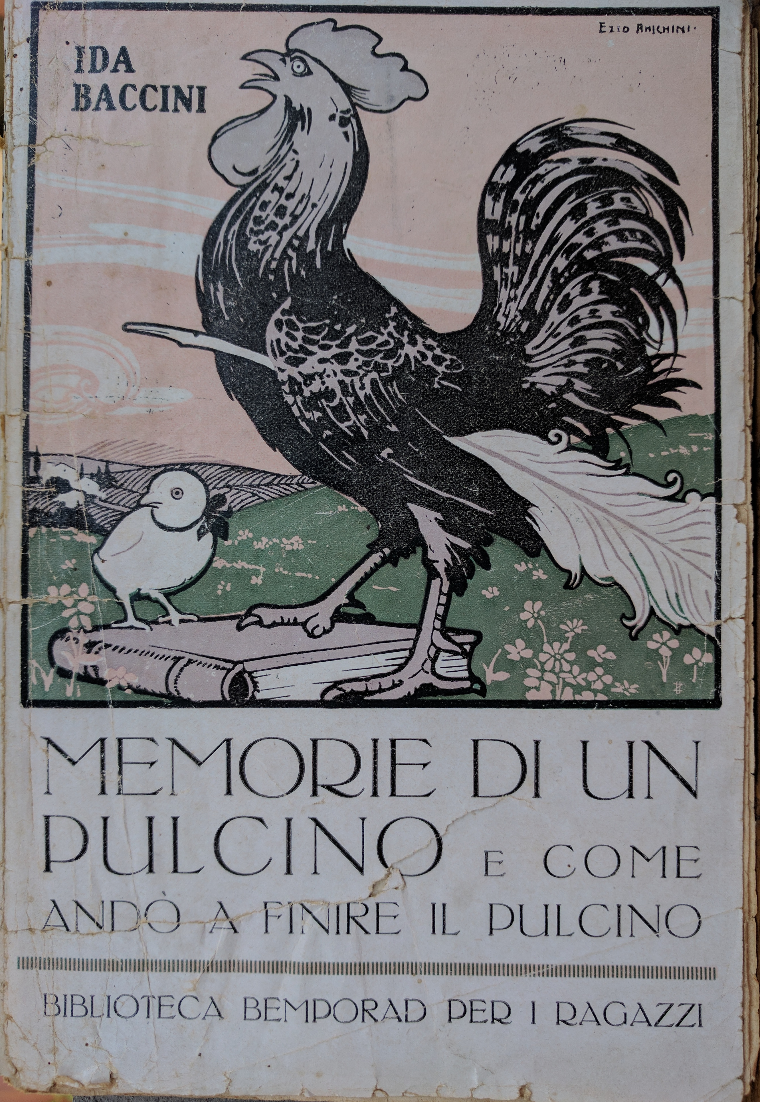 Ida Baccini, Memorie di un pulcino, 1917 copertina, disegno di Carlo Chiostri